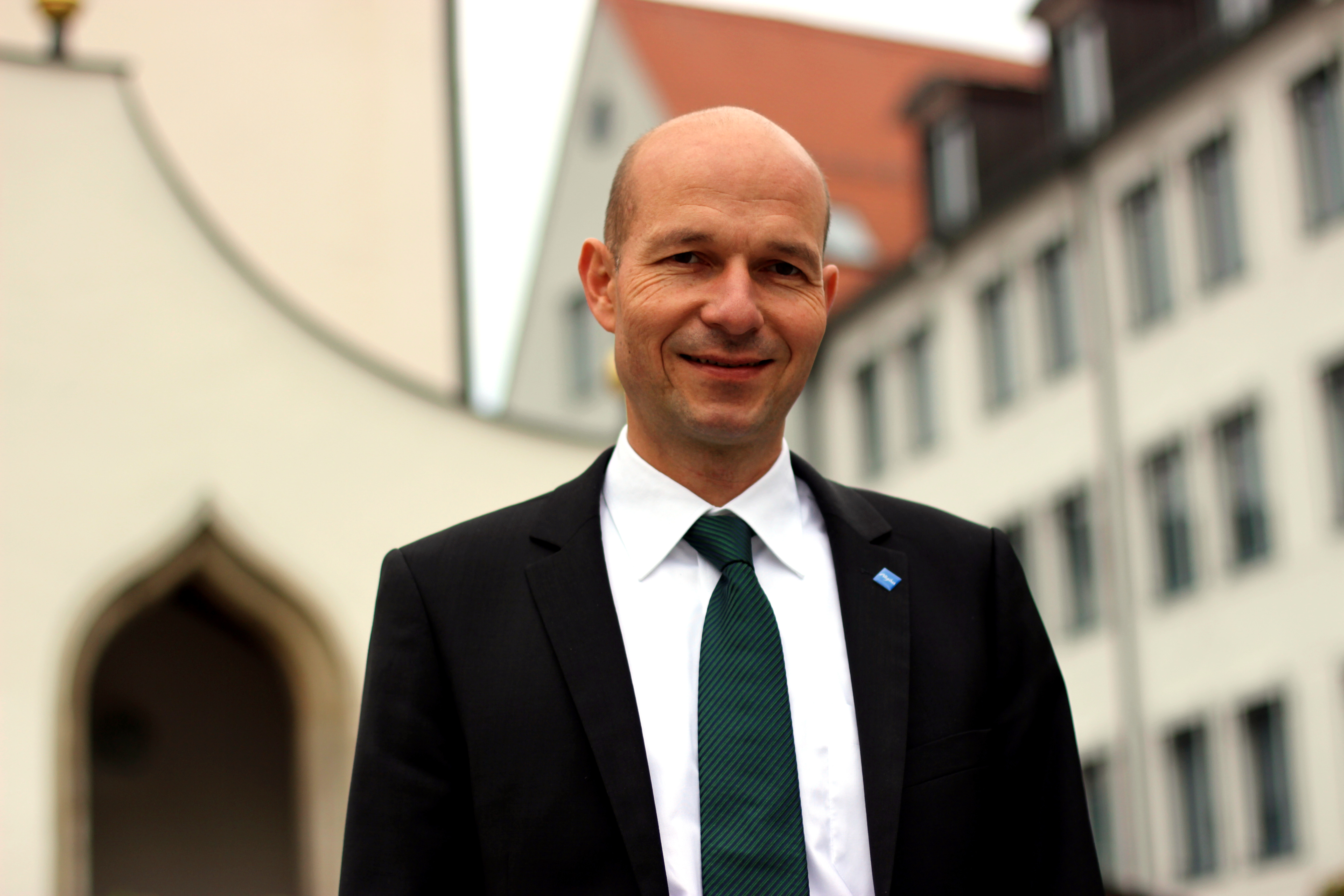 Thomas Kiechle, Oberbürgermeister der Stadt Kempten (Allgäu)